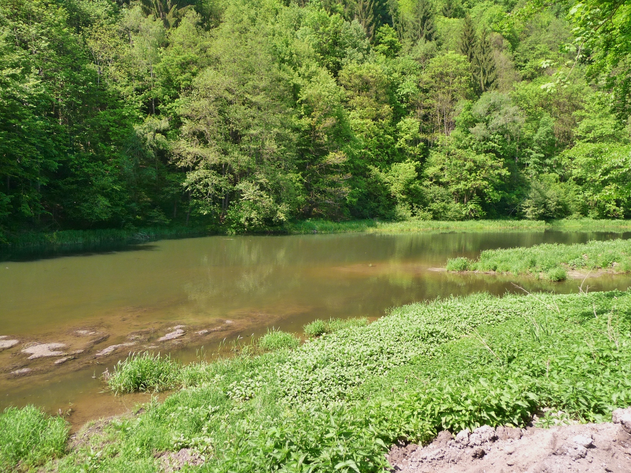 Die Gaißa im Landschaftsschutzgebiet Gaißatal